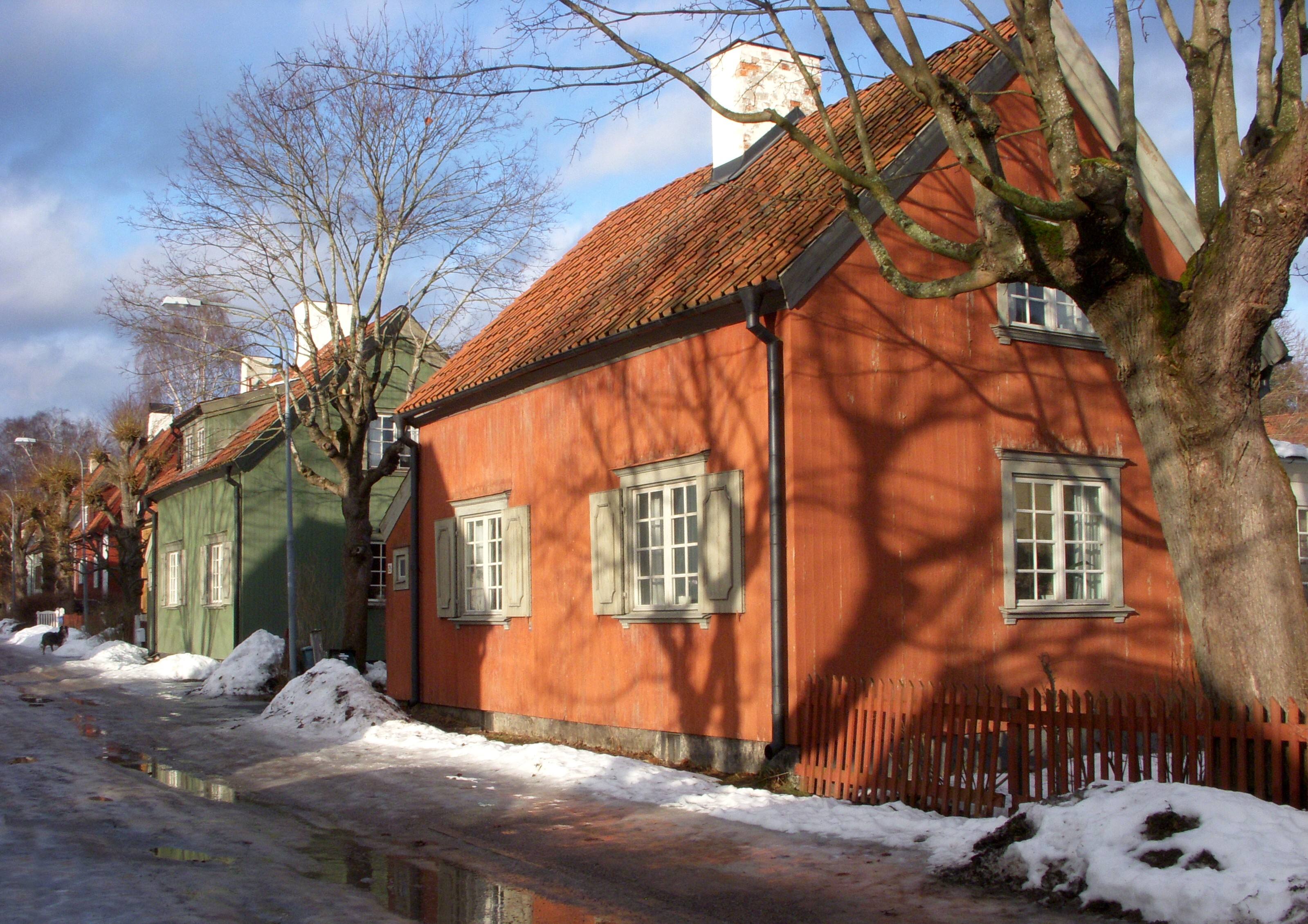 Enskededalen Magnebergsvägen 21 och 19